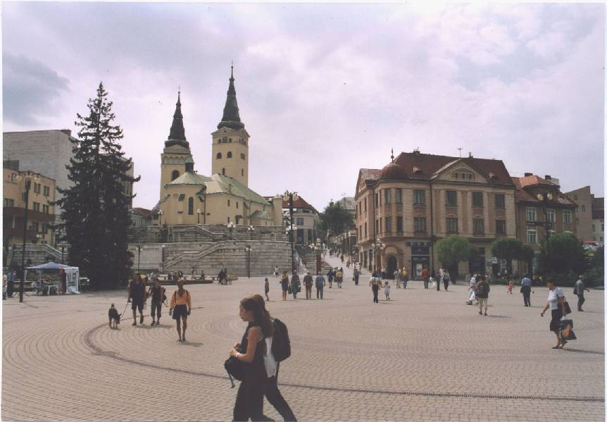 Zilina, Slowakei; mein eigenes Foto (August 2003)